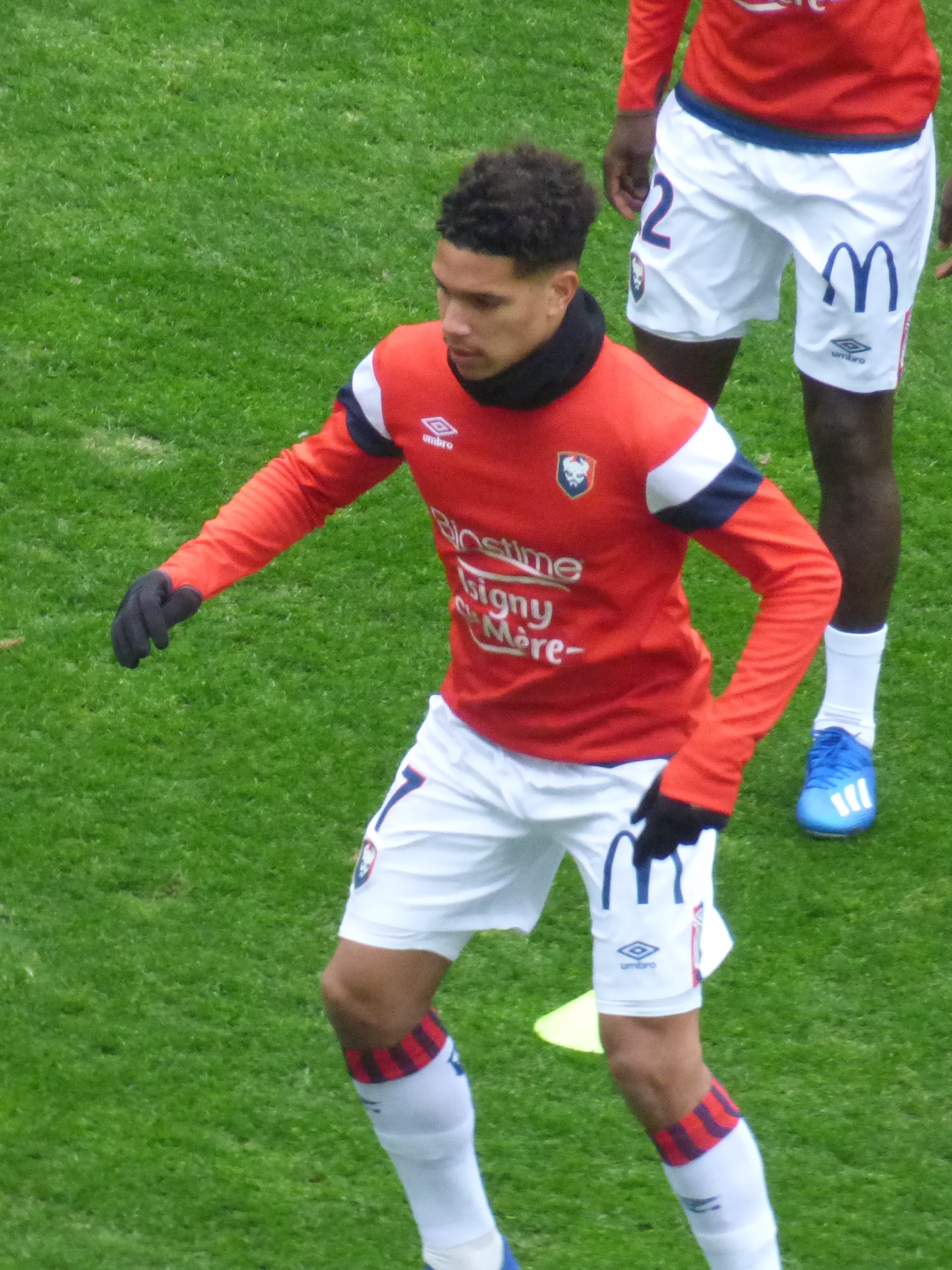 Nicholas Gioacchini avant le match RC Lens / SM Caen, comptant pour la vingt-sixième journée du championnat de France de football de Ligue 2 2019/2020, le 22 février 2020, au Stade Bollaert-Delelis